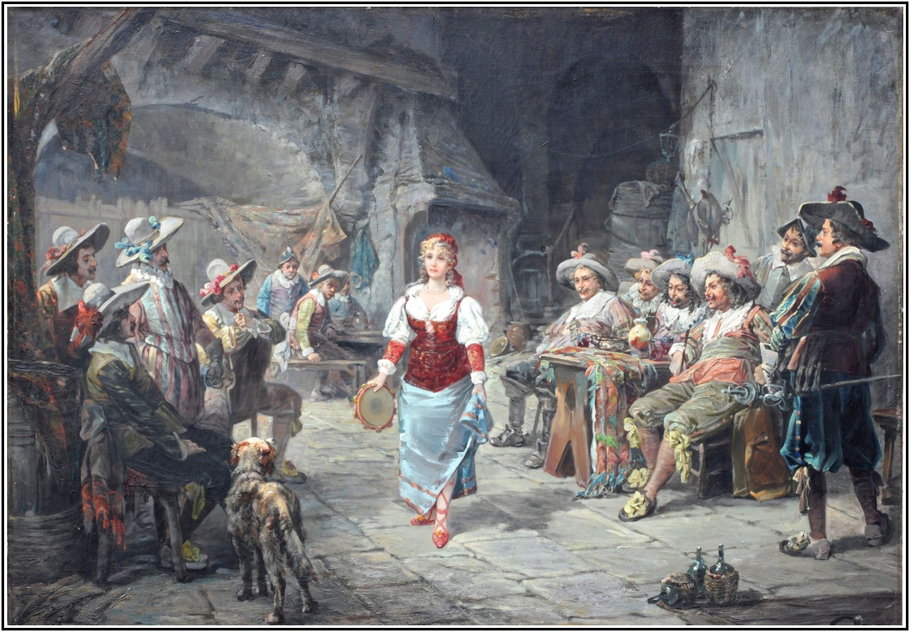 Luigi Giorgio Baldero "Csenes de taverne" 1880